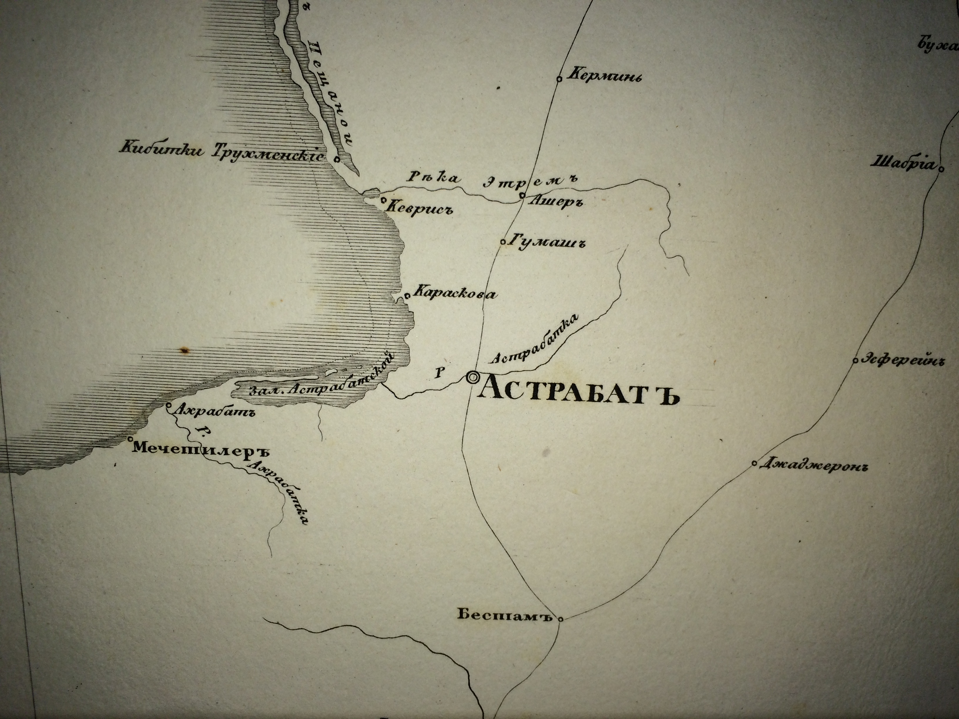 Астрабад (совр. Горган) Новая географическая дорожная карта Российской империи с означением 57 губерний, 8 областей, 4 градоначальств, 4 управлений, 8 воеводств, Земли Большой и Малой Кабарды и Киргиз Кайсаков. С показанием учебных округов, городов, примечательных мест, водяных сообщений, почтовых проезжих дорог, и расстояние между оными в верстах. Составлена и издана служащим в Военно-типографическом депо капитаном Медниковым.